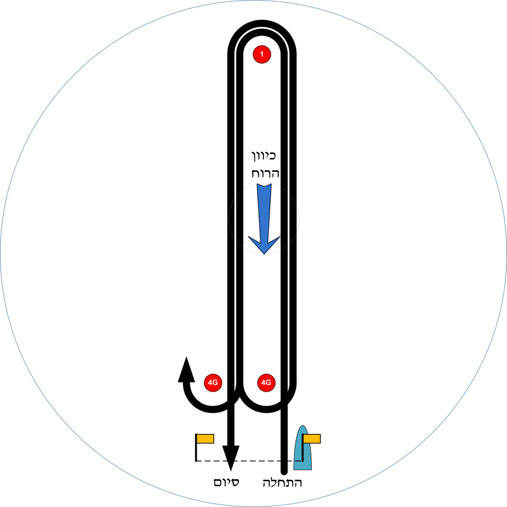 מסלול WD של השייט באולמפיאדת אטלנטה 1966